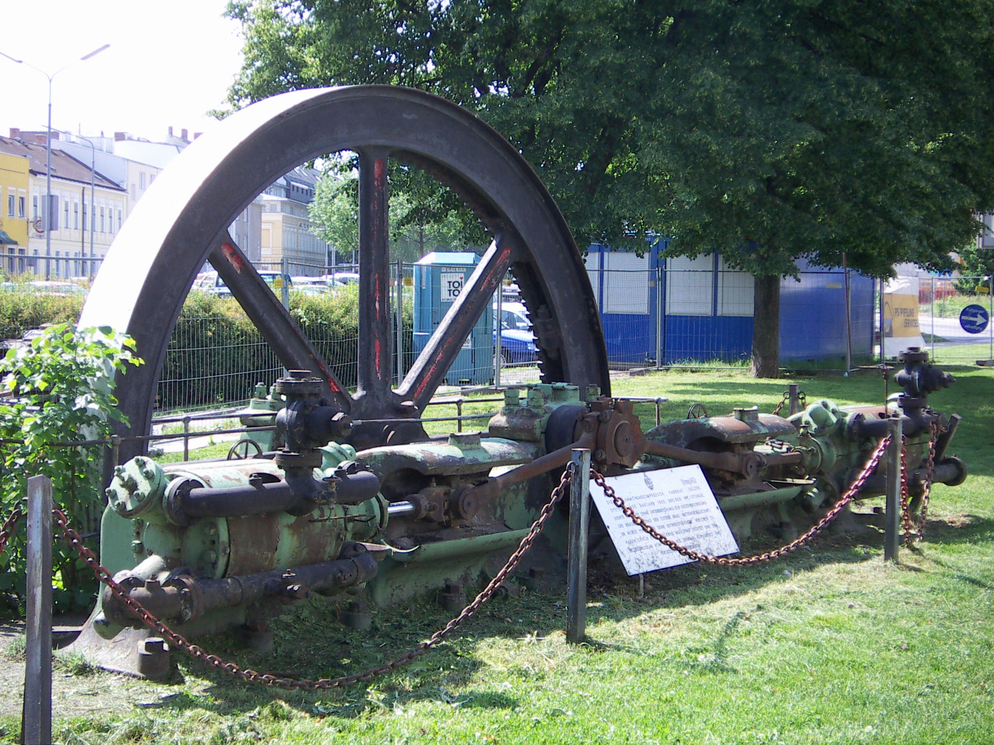 Ammoniakkompressor, Brauerei Liesing, Gebrauch von 1885 bis 1976, jetzt Objekt vom Bezirksmuseum Liesing, aufgestellt im mittleren Grünstreifen der Breitenfurter Straße in Liesing